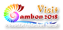 Lambang pariwisata Kota Ambon.